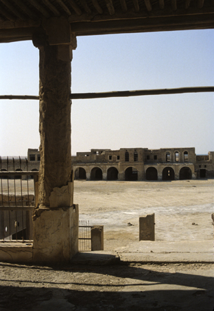 Uqair